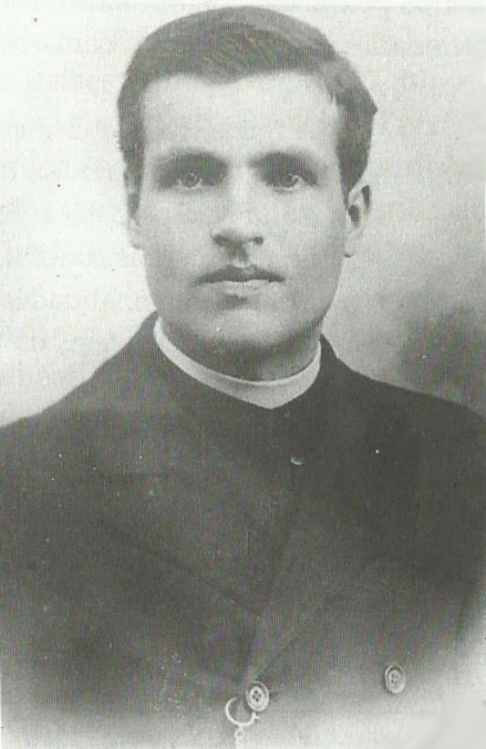 João Meneguzzi